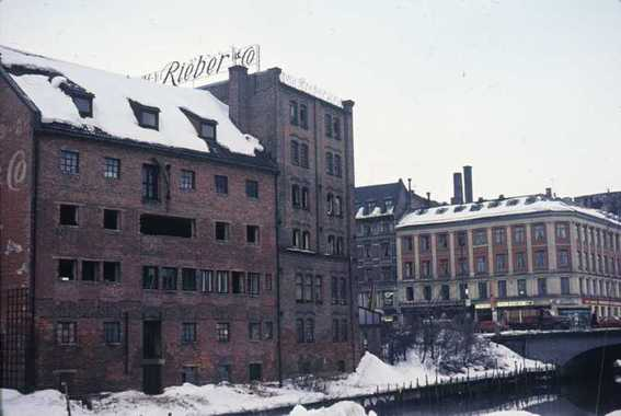 Næringsbygg i Vognmannsgata 44-46 tilhørende G.C. Rieber & Co., ca. 1960-1965